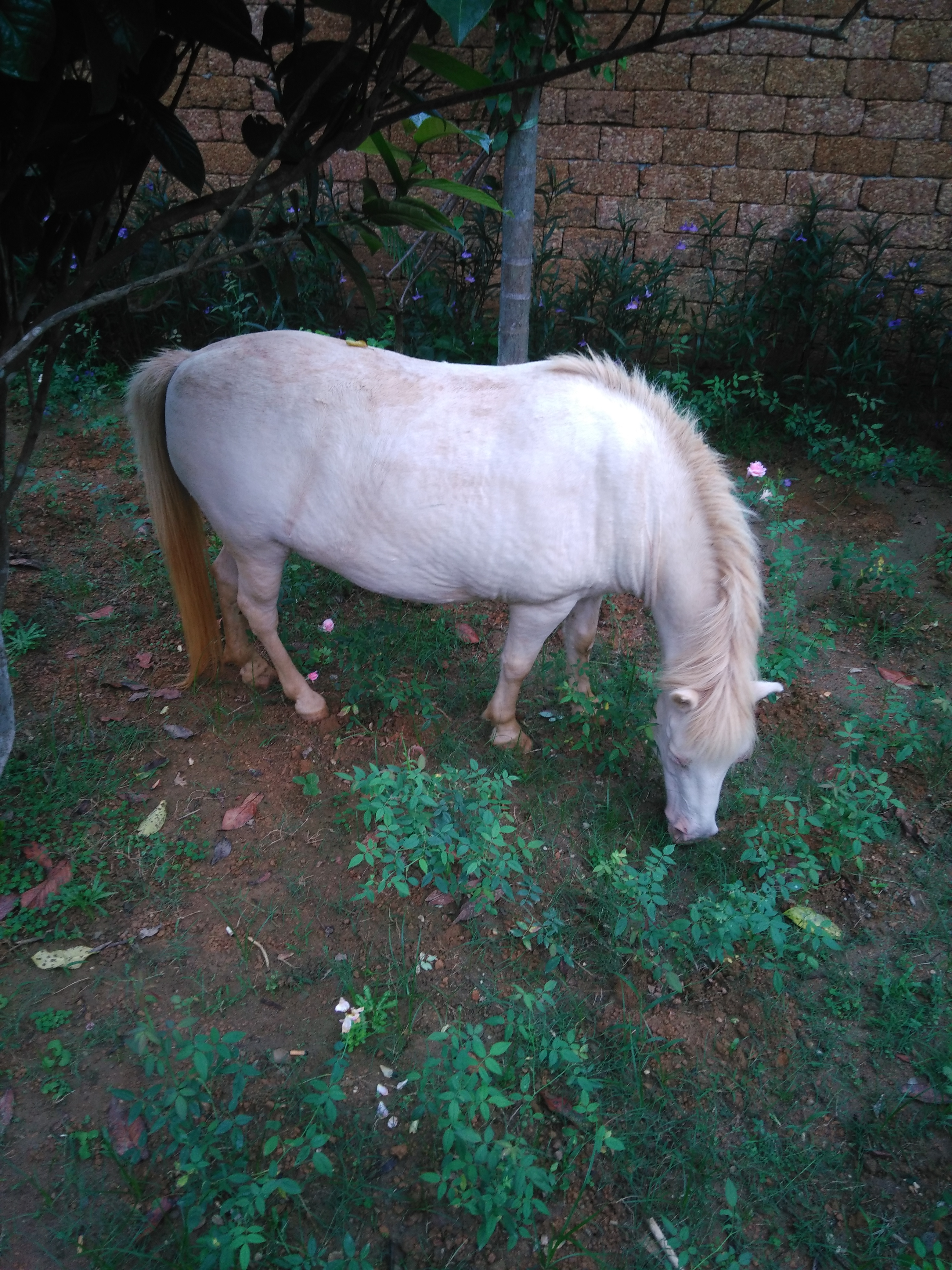 Hình tự chụp băng máy ảnh ca nhân về một con ngựa bạch Việt Nam tại Trung Sơn Trầm, Sơn Tây